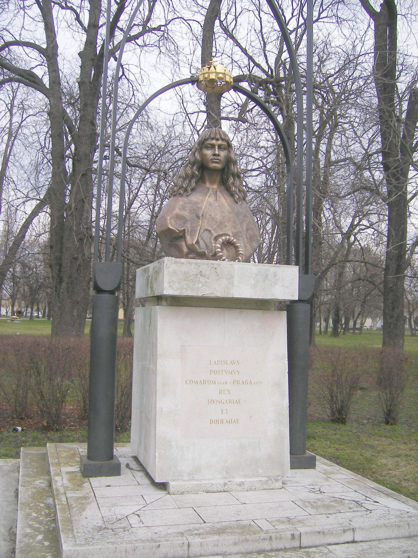 V. László király szobra az Anglia-parkban